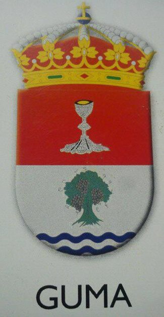 Escudo de Guma